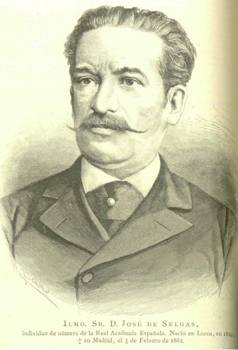 Ilmo. Sr. D. José de Selgas, académico de número de la Real Academia Española. Nació en Lorca en 1824, murió en Madrid el 5 de febrero de 1882.